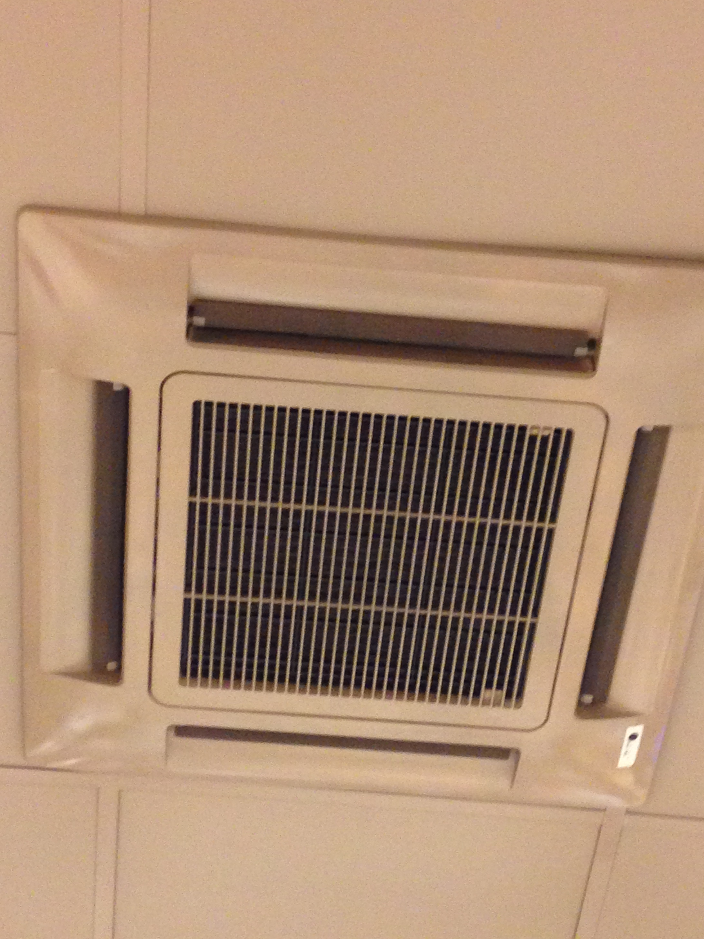 Ceiling air conditioner at bank